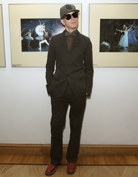 Церемония награждения премией «Золотая маска» — 2013 года.